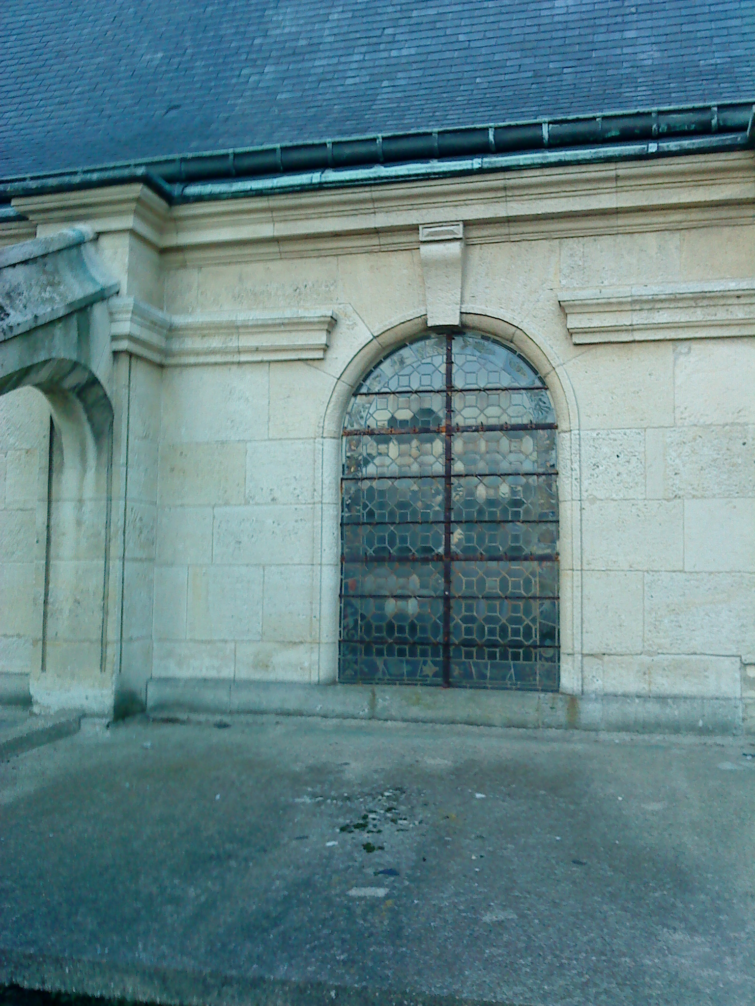 Les baies vitrés de la nef (deuxième niveau).